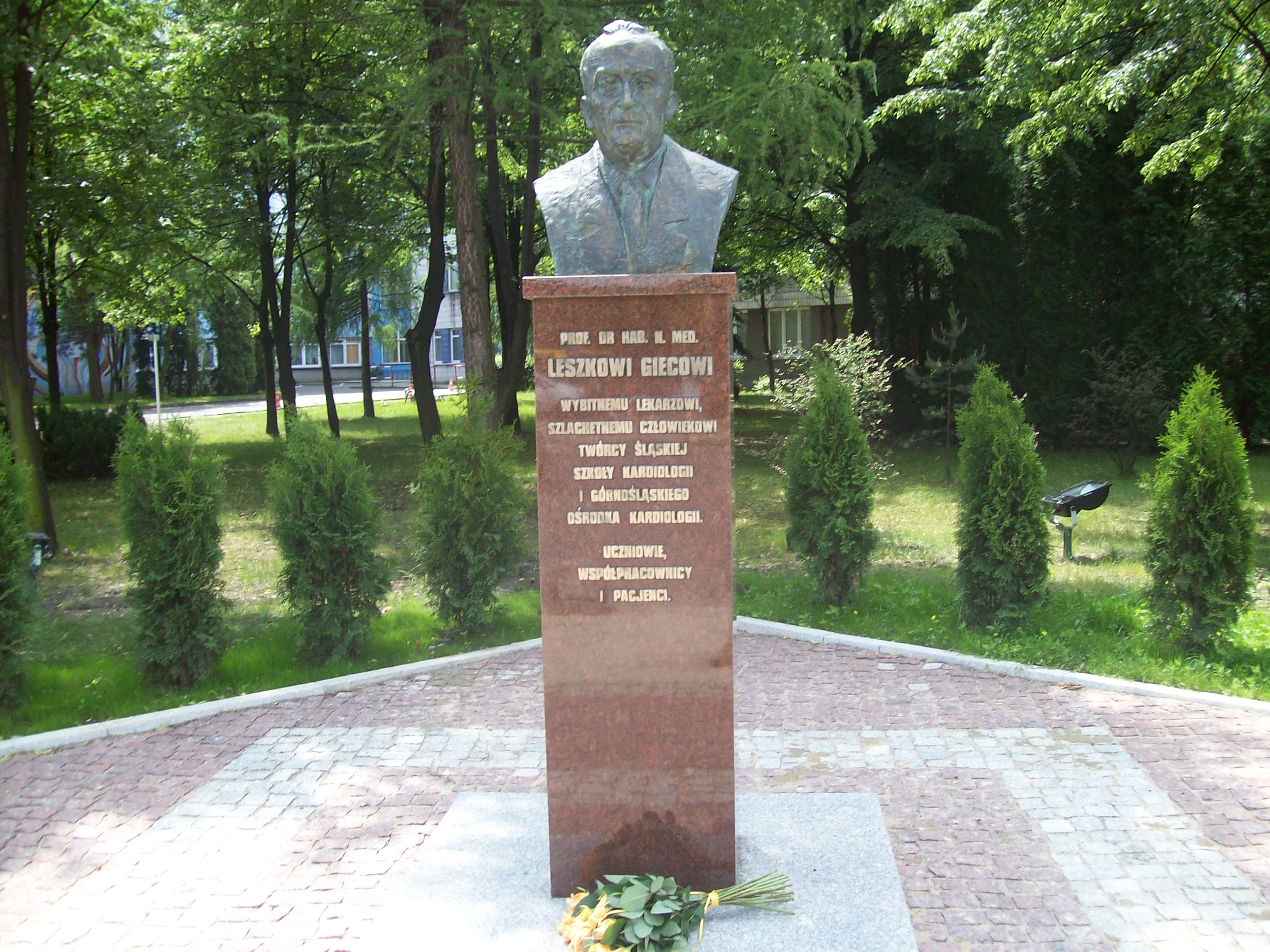 Katowice-Ochojec, popiersie Leszka Gieca